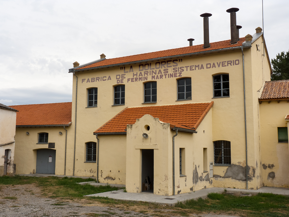 Fábrica de harinas La Dolores, Caldearenas, Huesca, España